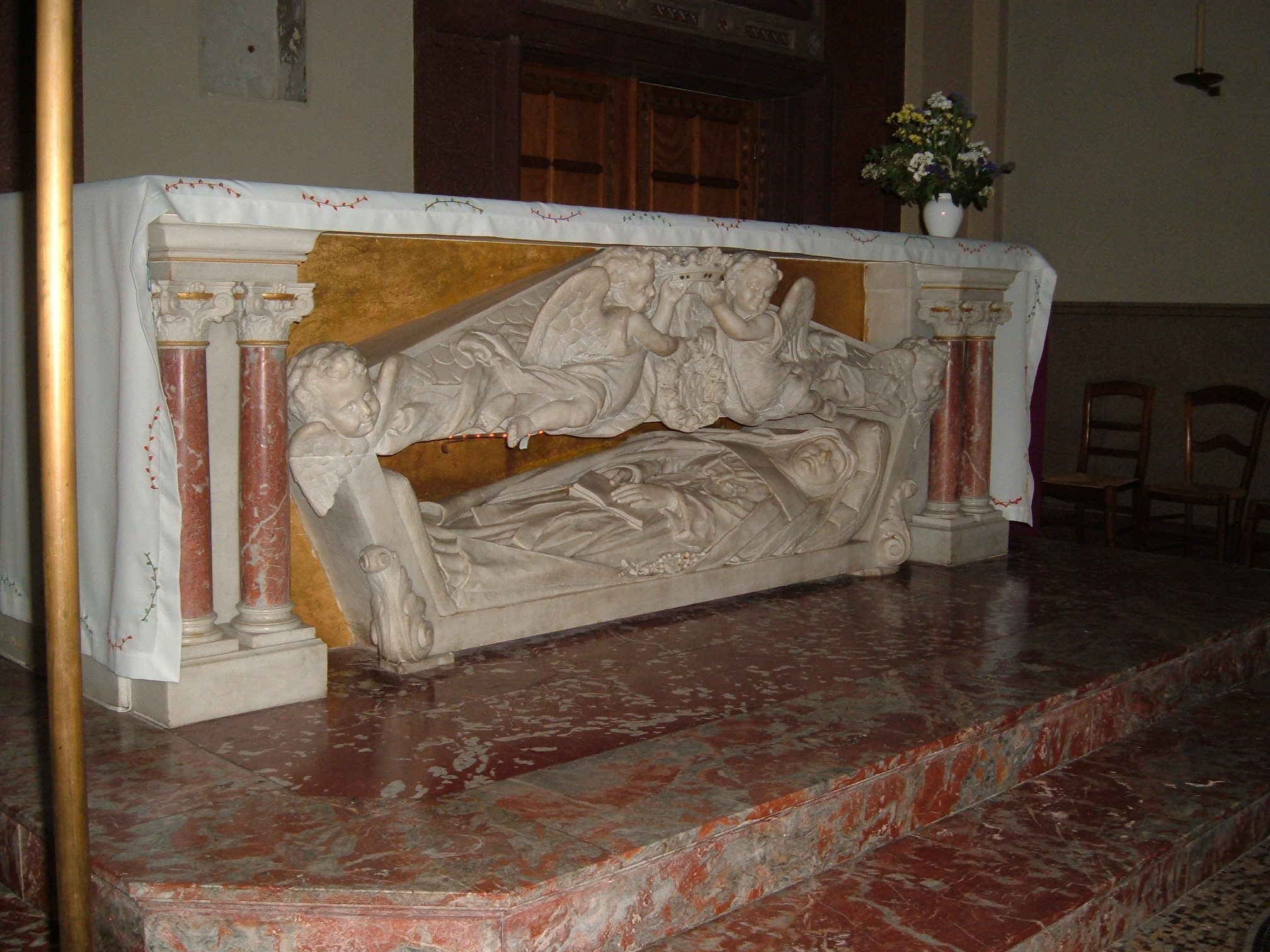 Autel reliquaire de Sainte-Jeanne de Lestonnac, dans la chapelle de l'Ecole Notre-Dame, rue du Palais Gallien à Bordeaux, prise par Cédric TARTAUD-GINESTE, avril 2006